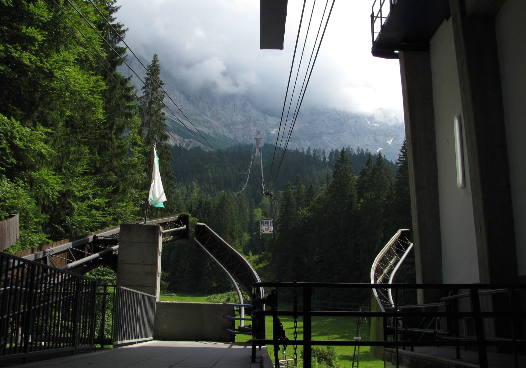 Seilbahn-Auffahrt zur Zugspitze vom Eibsee aus